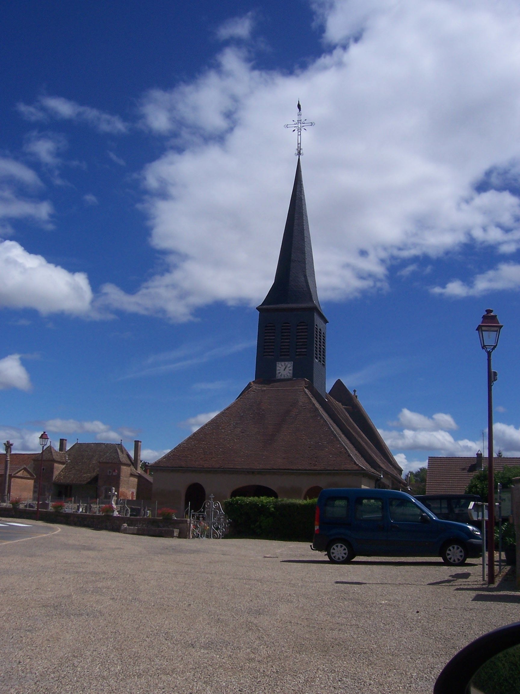 Eglise de Longepierre